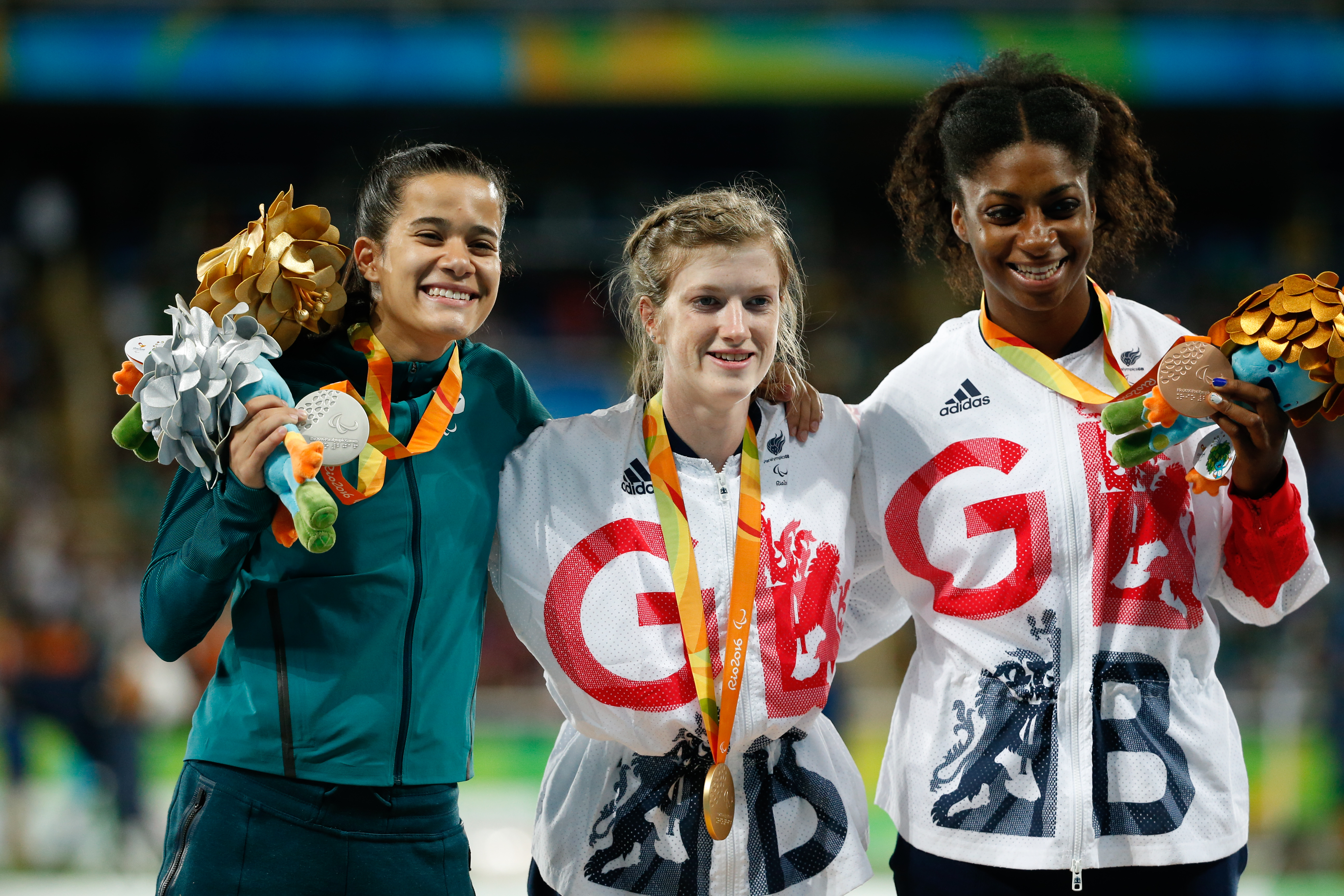 Rio de Janeiro - Brasileira Veronica Hipolito leva medalha de prata nos 100m T38 nos Jogos Paralímpicos Rio 2016, no Estádio